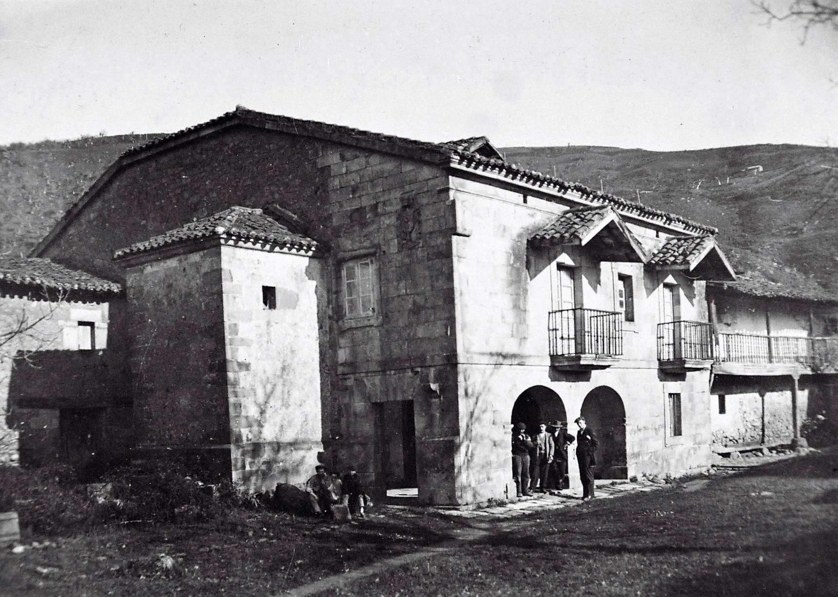 Vista de fotografía de los años 20 del Palacio del Marqués del Castañar en el barrio del Acebal de Vargas.Cantabria.